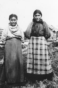 Slavey girls, Mackenzie River, Northwest Territories (NWT).